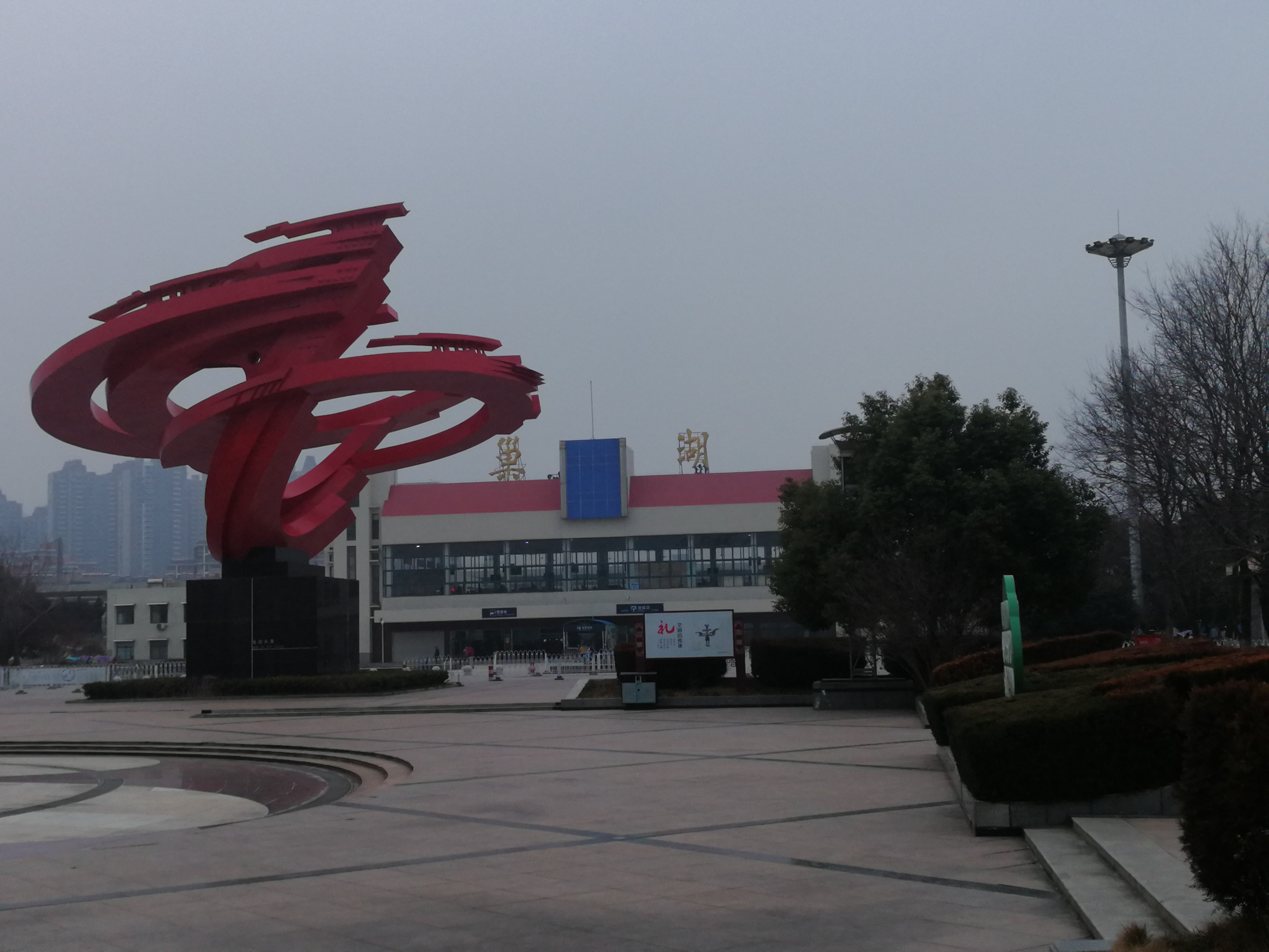 巢湖火车站及其周边